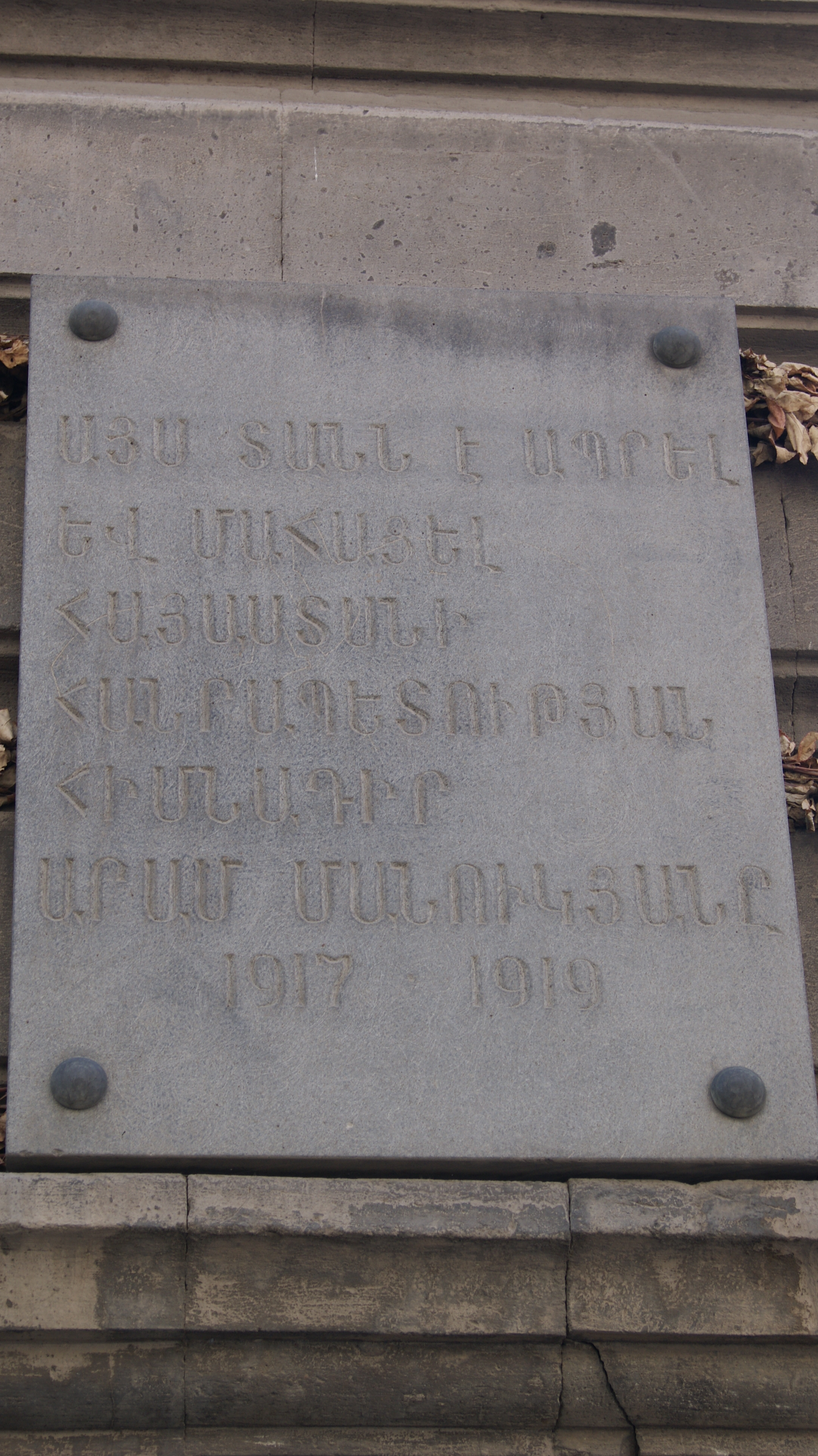 Արամի փողոց 9 6/206.2